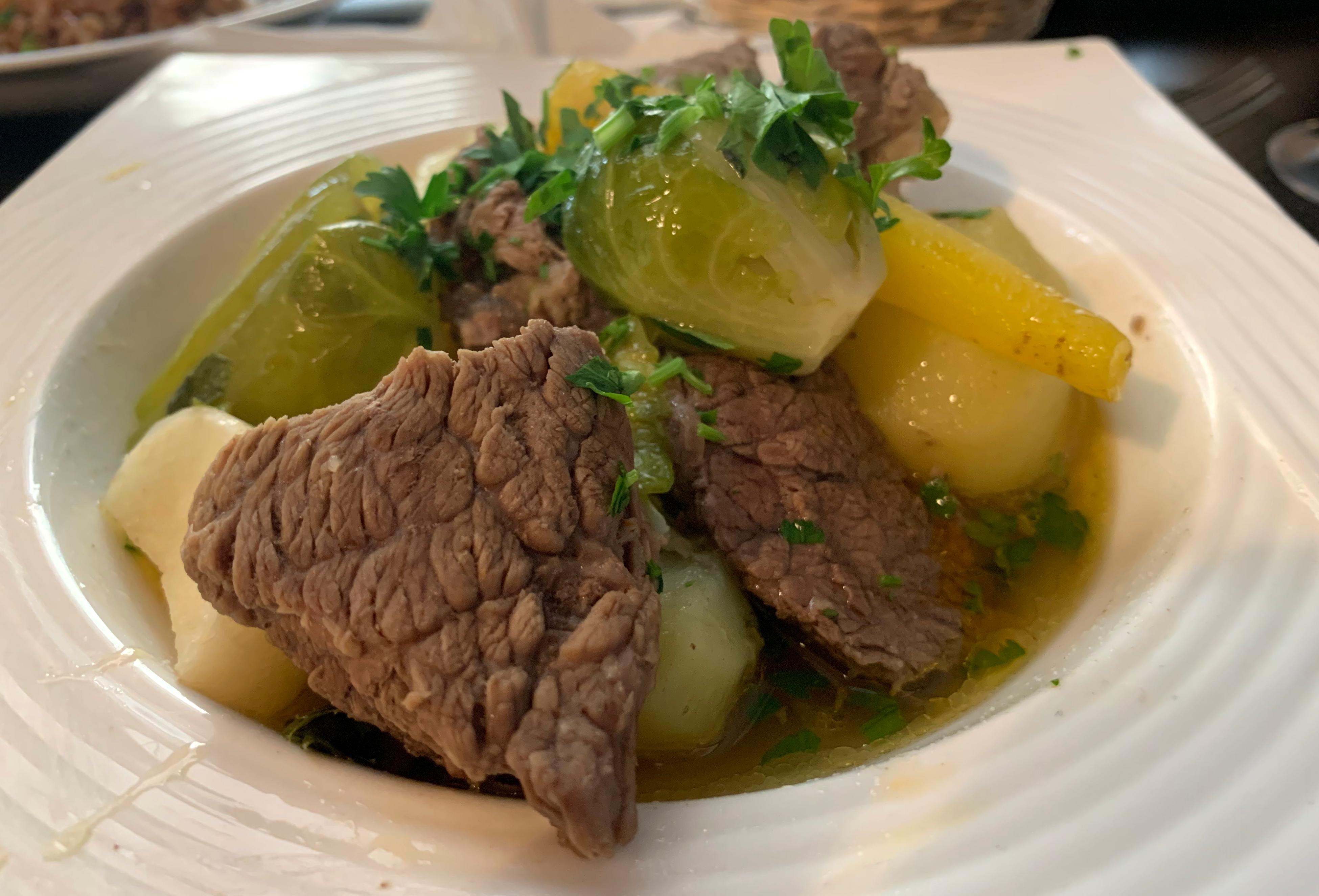 Restaurant Volga (Lyon).